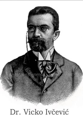 Dr. Vicko Ivčević - rakouský právník a politik chorvatské národnosti